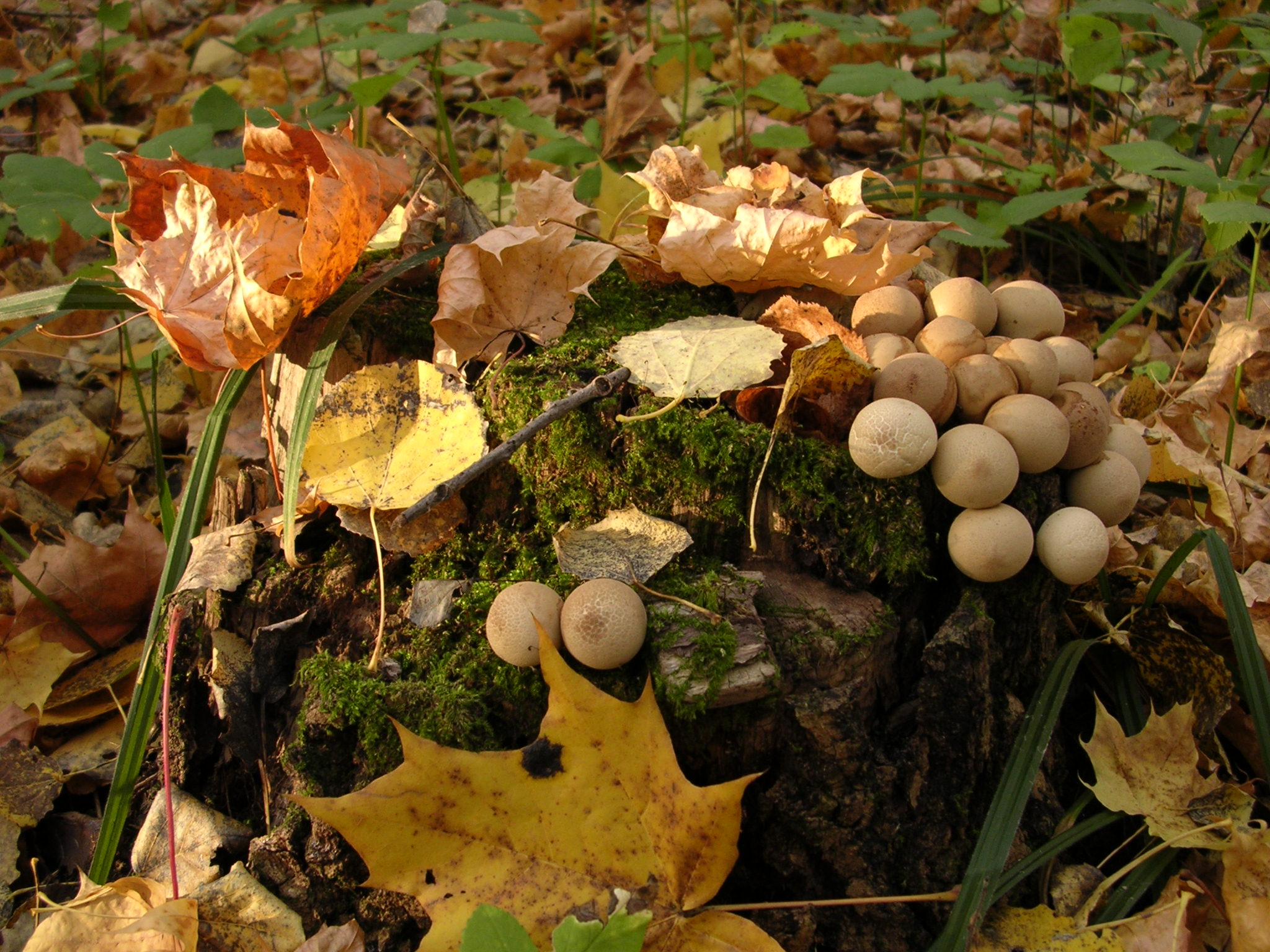 Дождевик